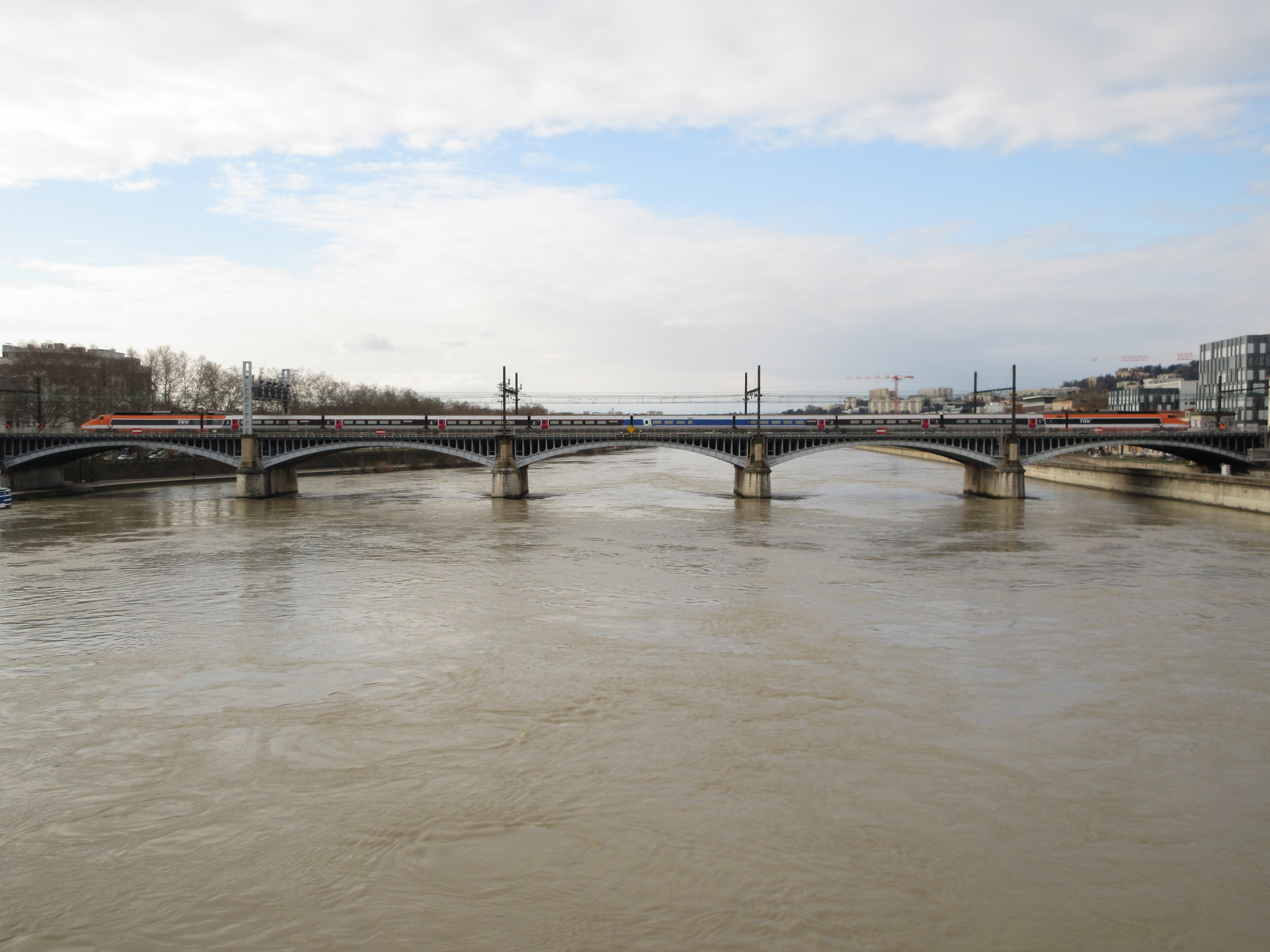 ローヌ川の鉄橋を渡ってリヨン・ペラーシュ駅に入るTGV Sud-Est第一編成